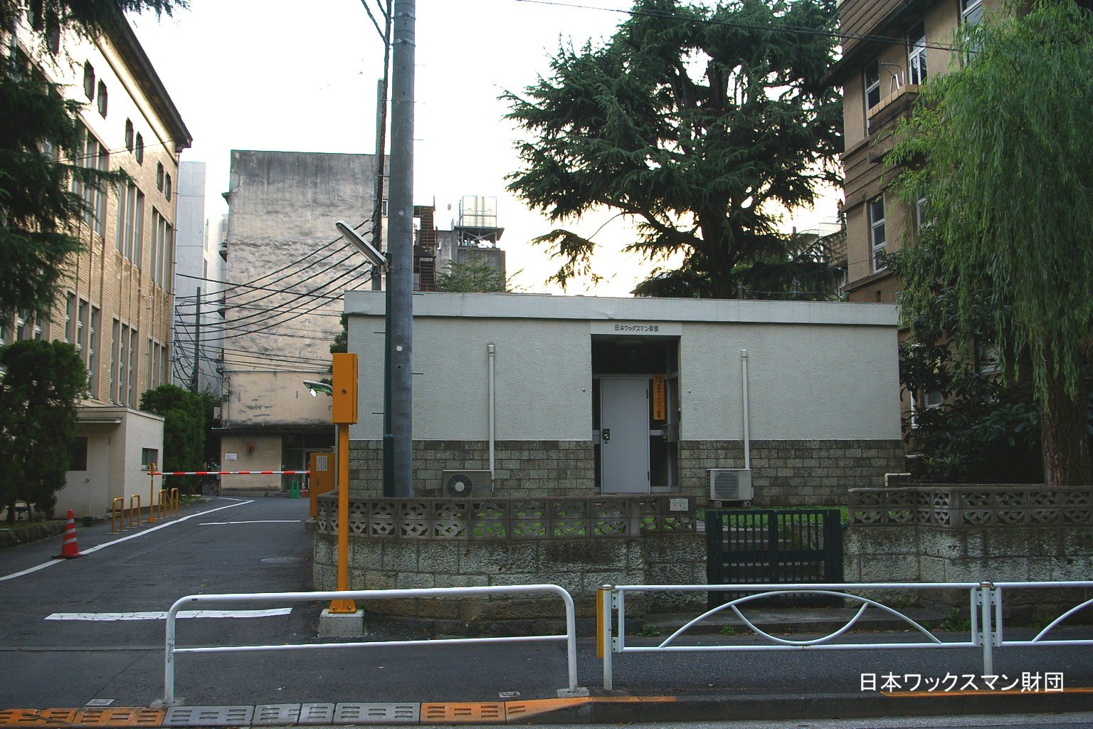 2009.5日本国内で塾生 (talk)が撮影。